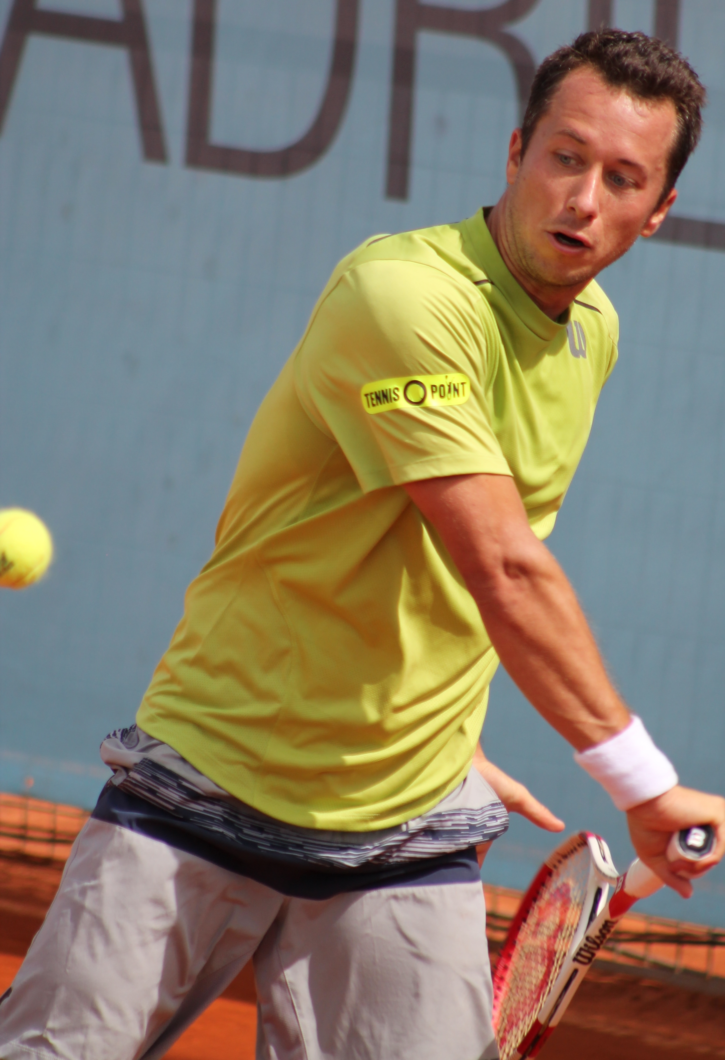 Kohlschreiber MA14 (13)